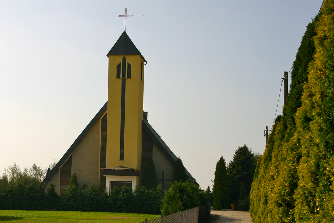 Komorno - rzymskokatolicki kościół filialny p.w. MB Fatimskiej